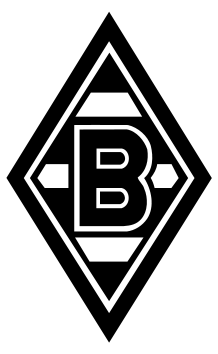 Logo Borussia Mönchengladbachs